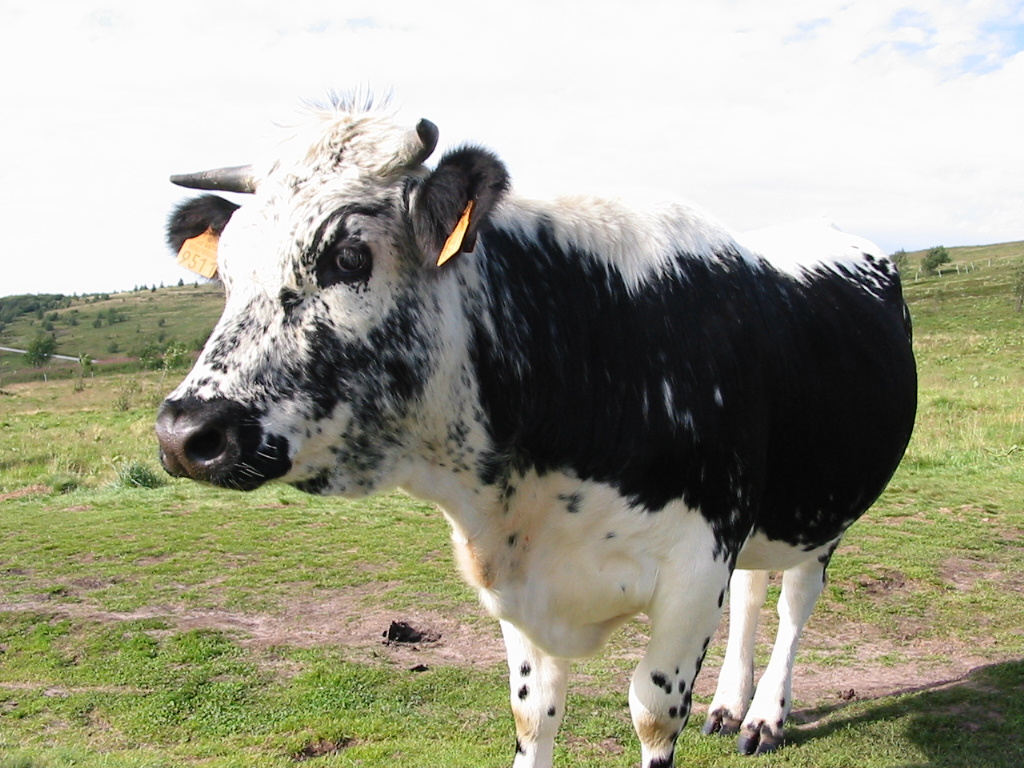 Génisse de race vosgienne Photo personnelle, prise le 23 août 2004, sur la chaume du Hohneck Licence : GFDL Christian Amet Category:Vosges